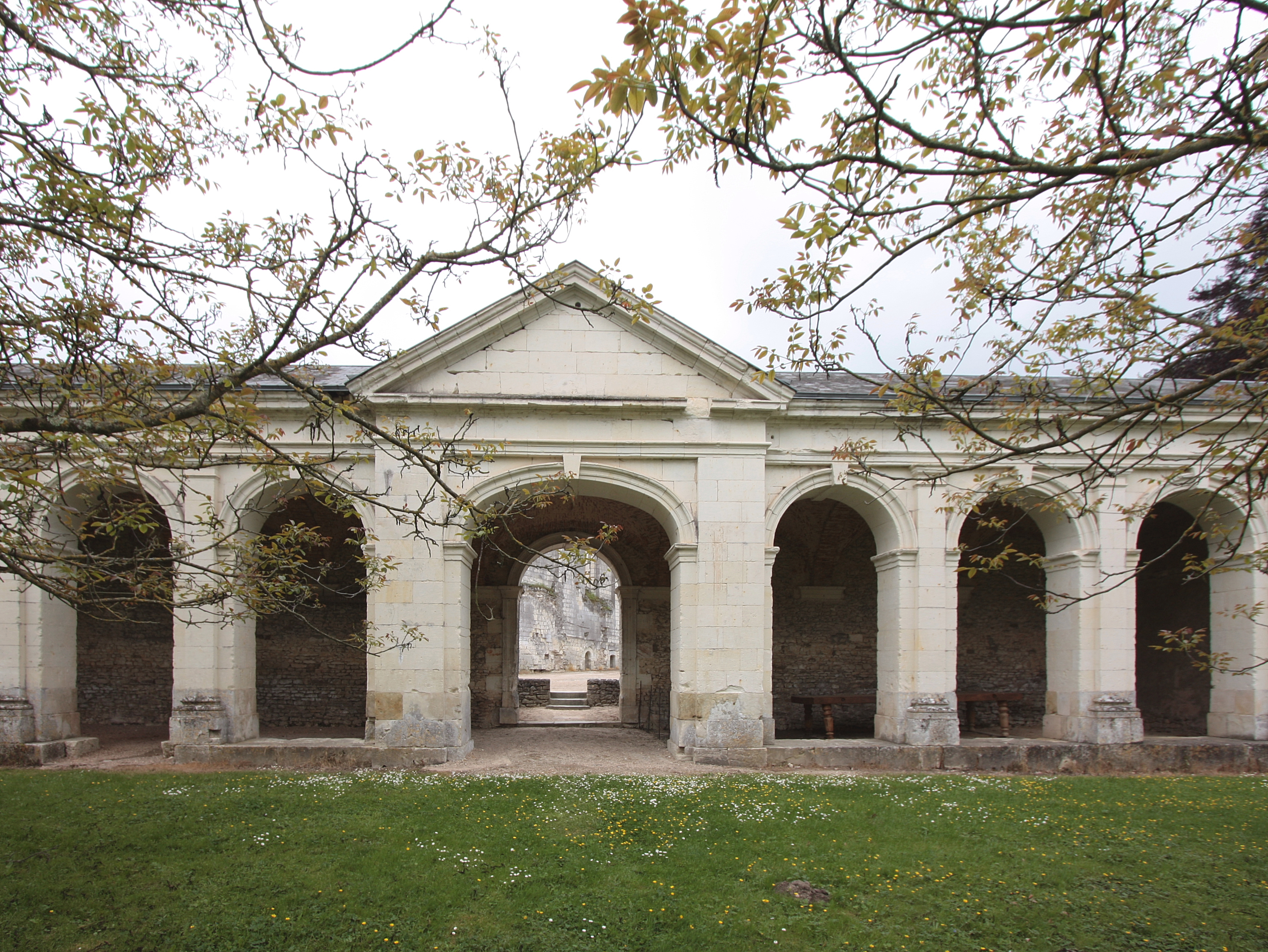 Ehemaliges Kartäuserklosters Chartreuse Saint-Jean du Liget in der französischen Gemeinde Chemillé-sur-Indrois im Département Indre-et-Loire - erhaltener Trakt an der westlichen Stirnseite der Klosteranlage.